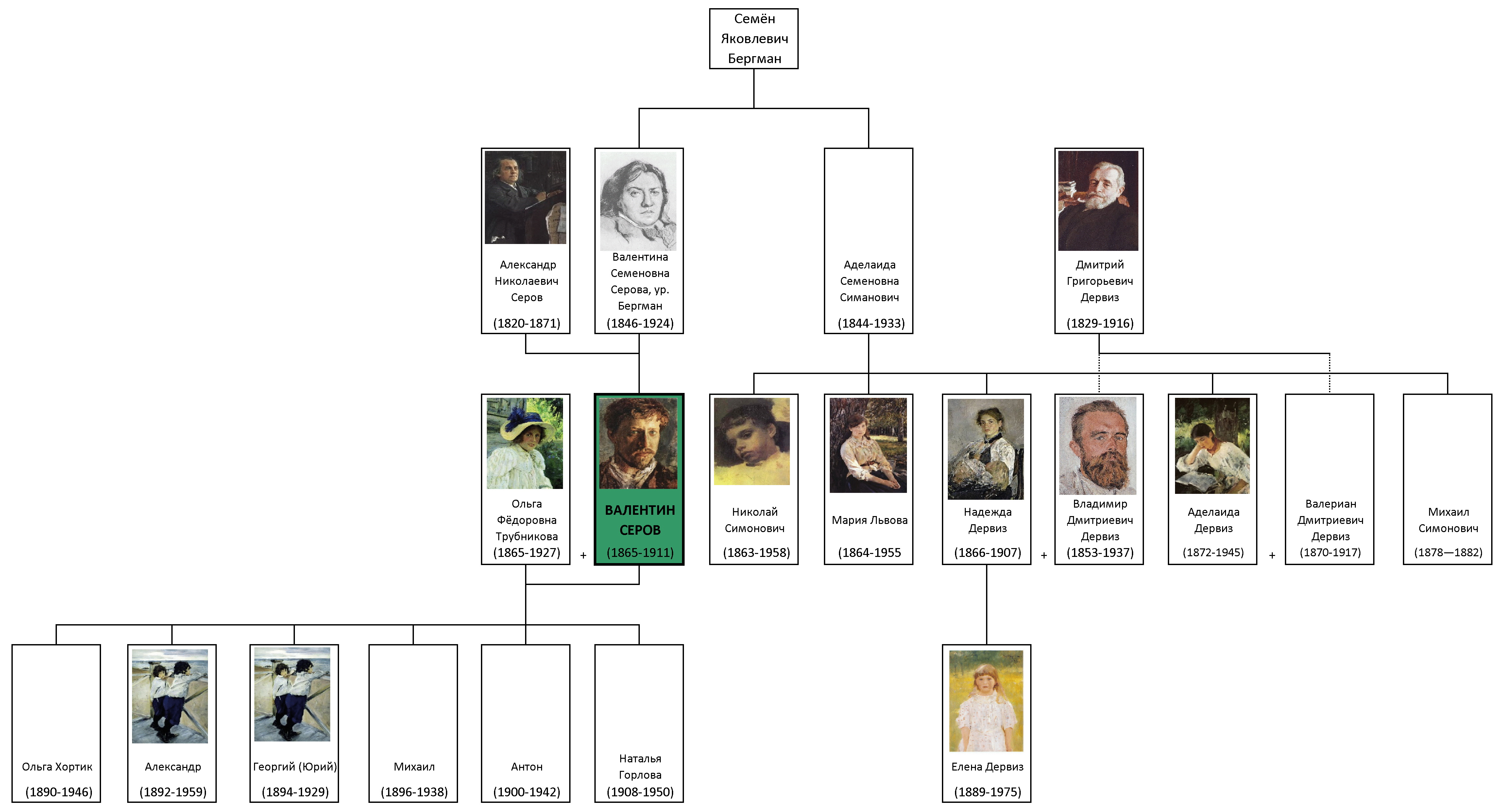 Семья Валентина Серова